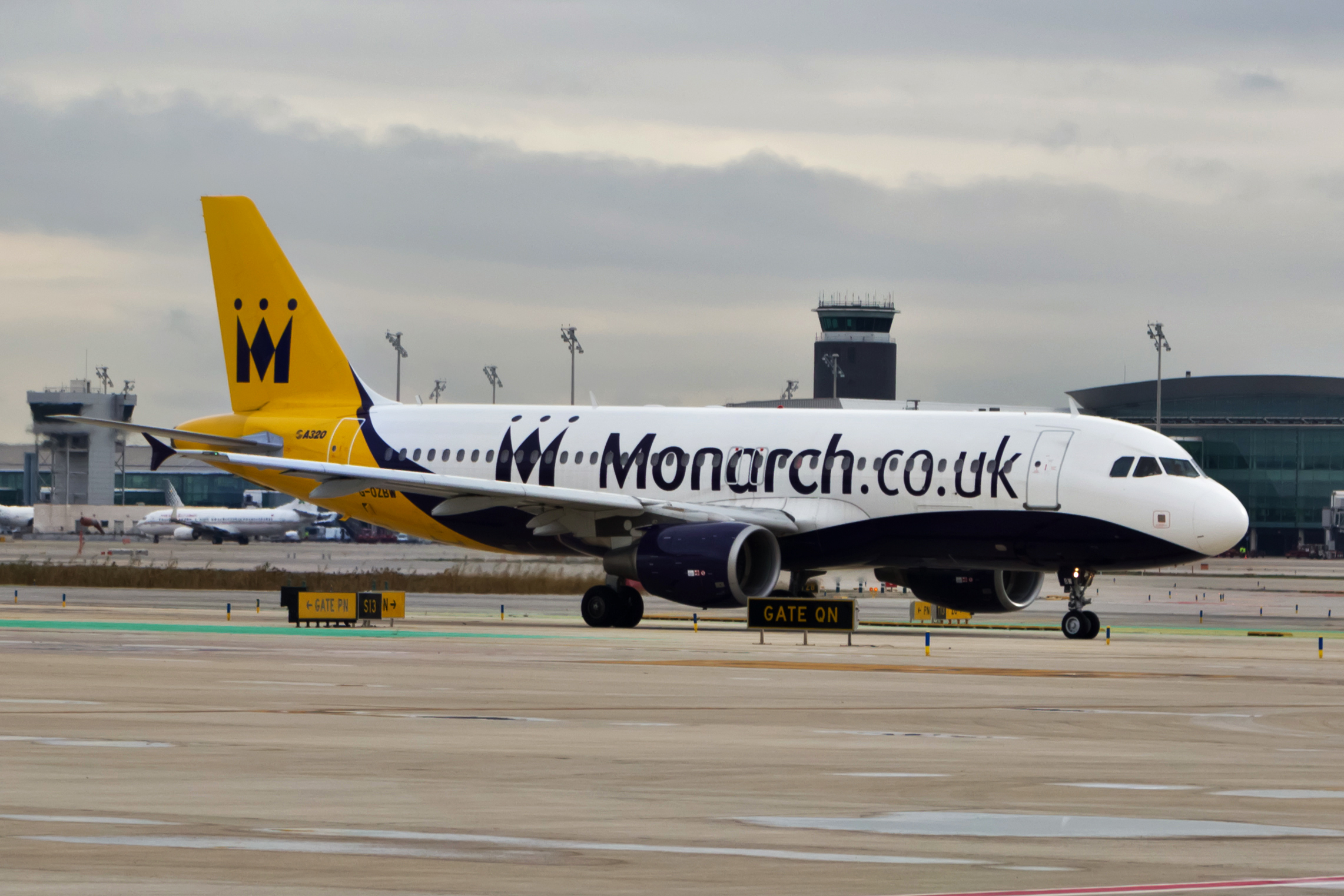 Airbus A320 de Monarch no aeroporto de Barcelona.